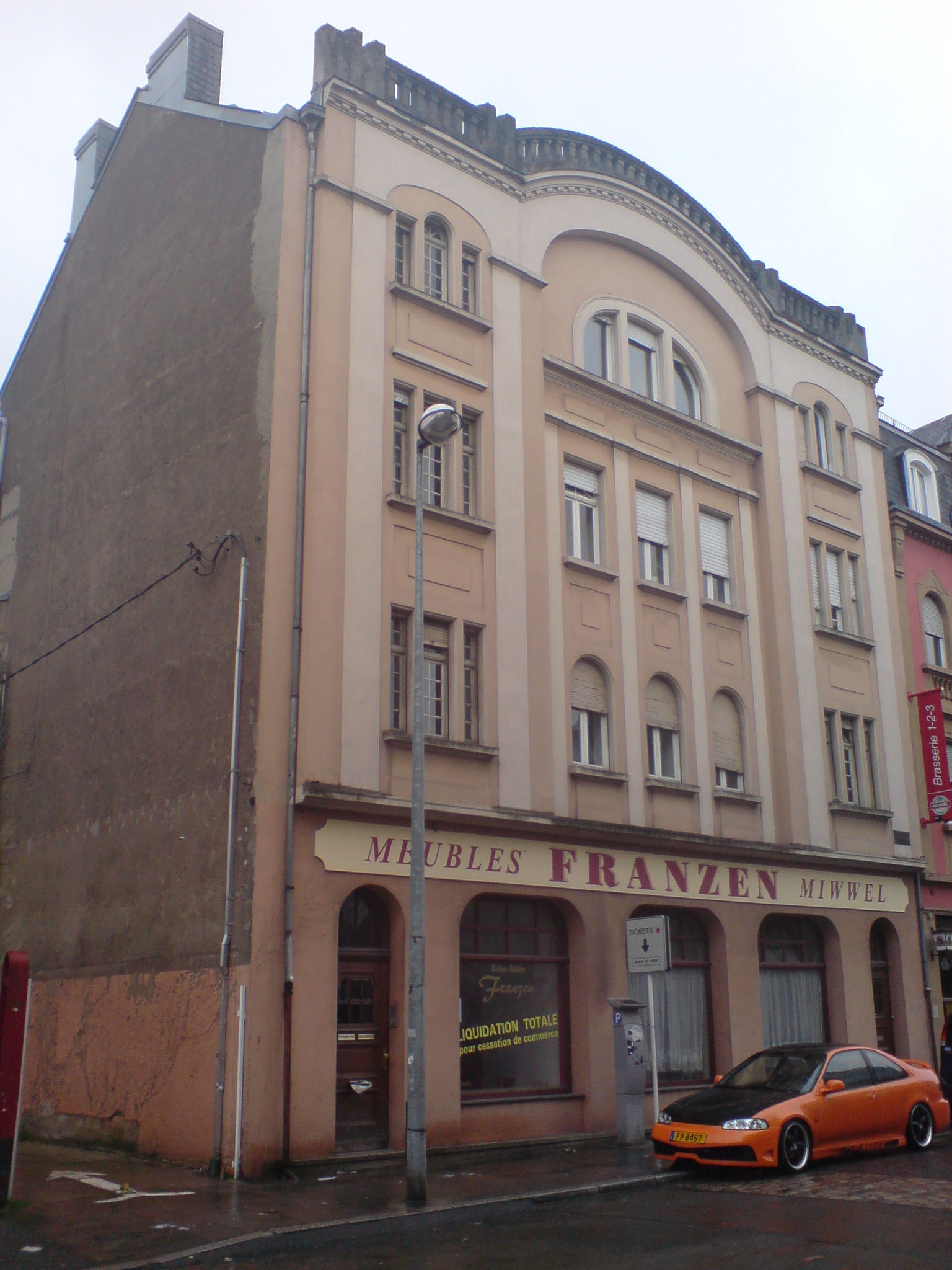 Sujet: de fréiere Kino Moderne zu Esch Uelzecht auteur: Oennenzopp